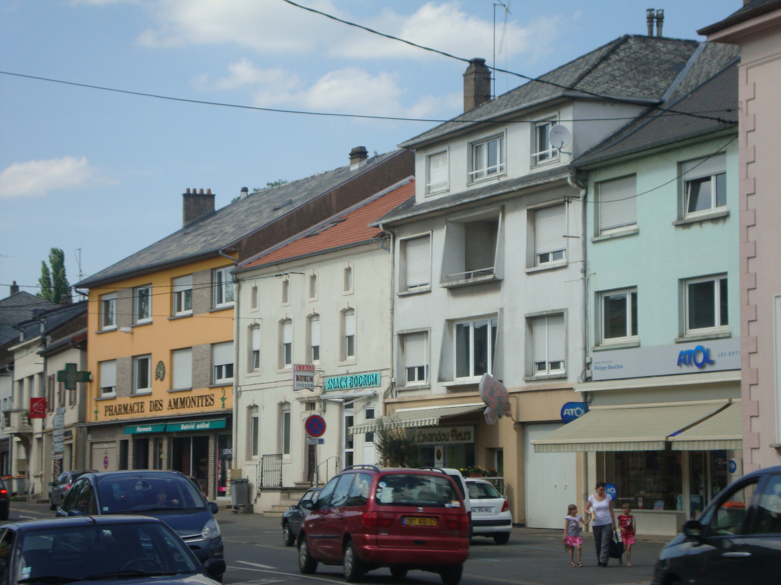 Centre-ville - Hettange-Grande (57)